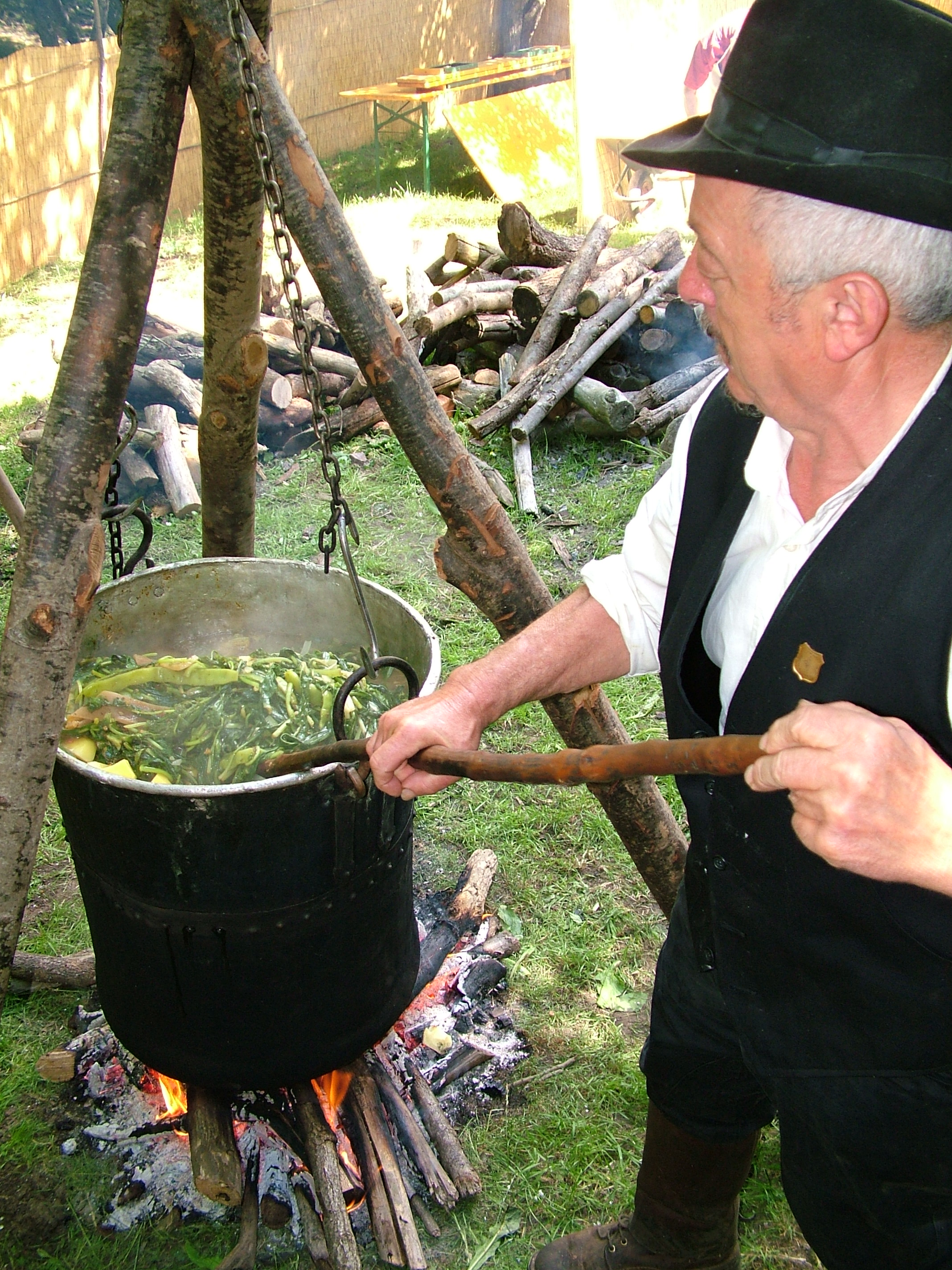 Preparazione dell'acquacotta da parte dei Butteri di Canale Monterano.